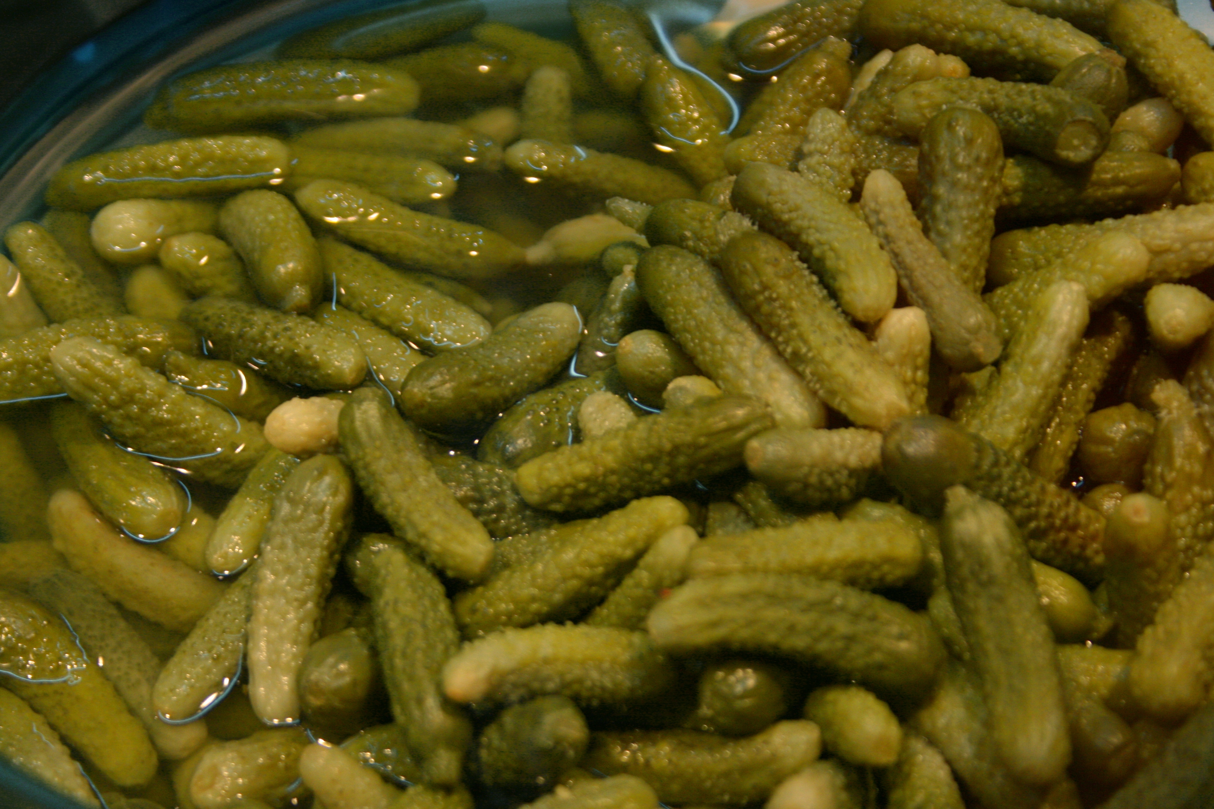 Pepinillos de tamaño pequeño encurtidos